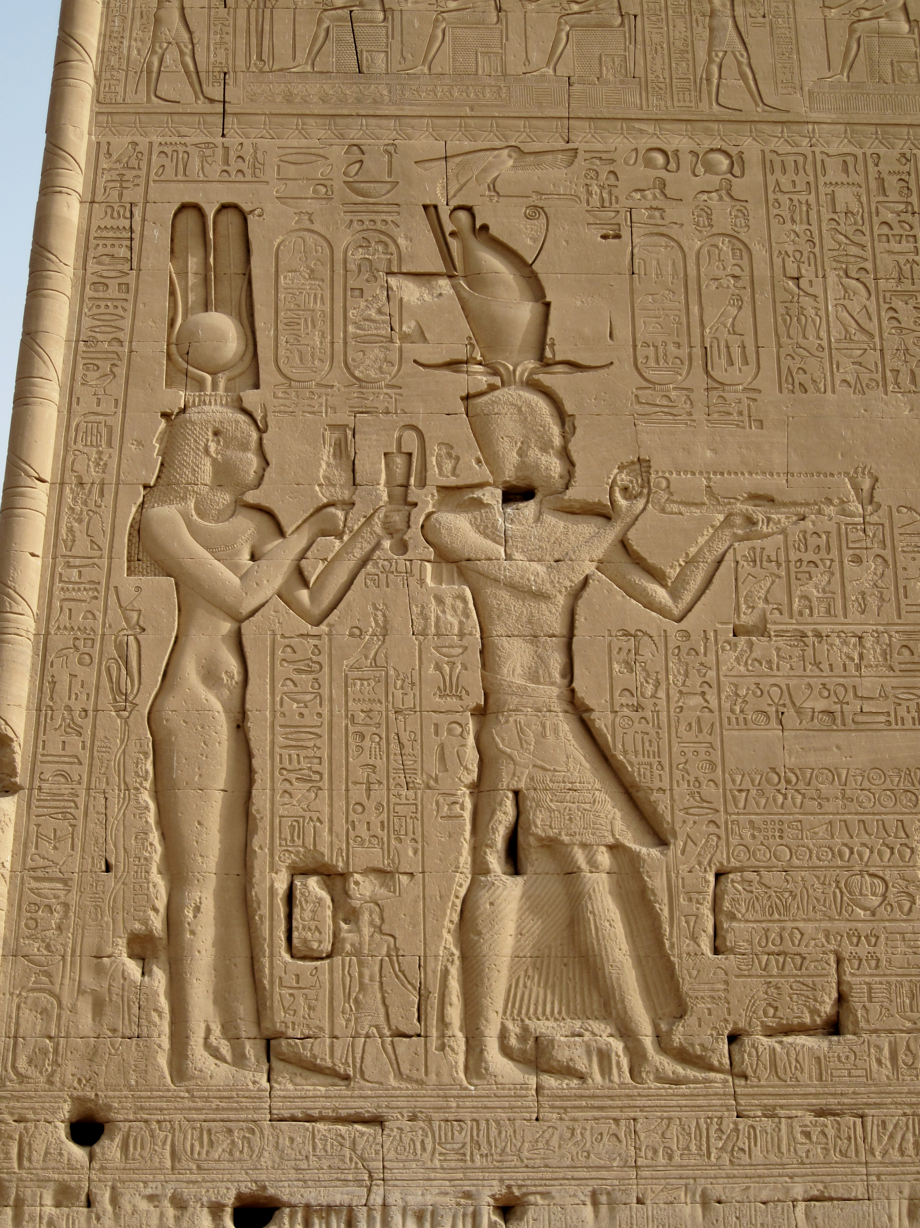 Relief der ptolemäischen Pharaonin Kleopatra VII. und ihres Sohnes Caesarion an der Südwestseite des Tempels von Dendera, Ägypten